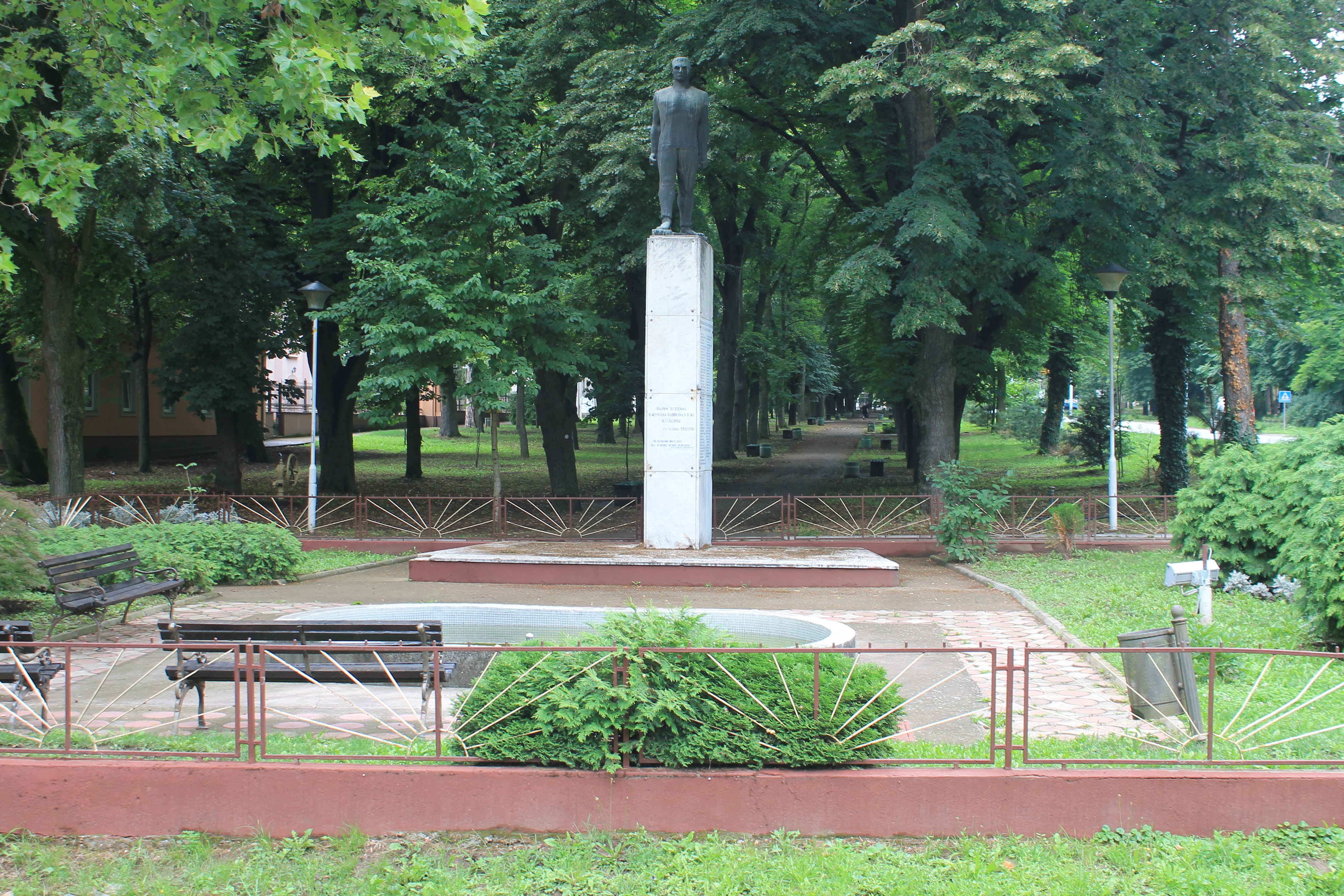 Erdevik